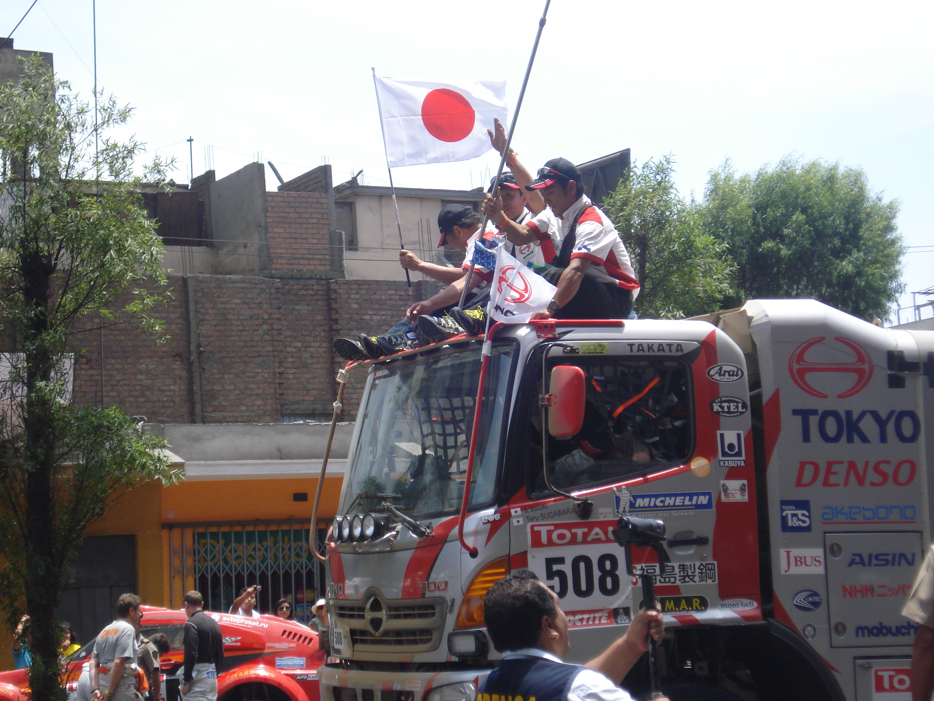 Sugawara y Suzuki en Lima - Dakar 2012